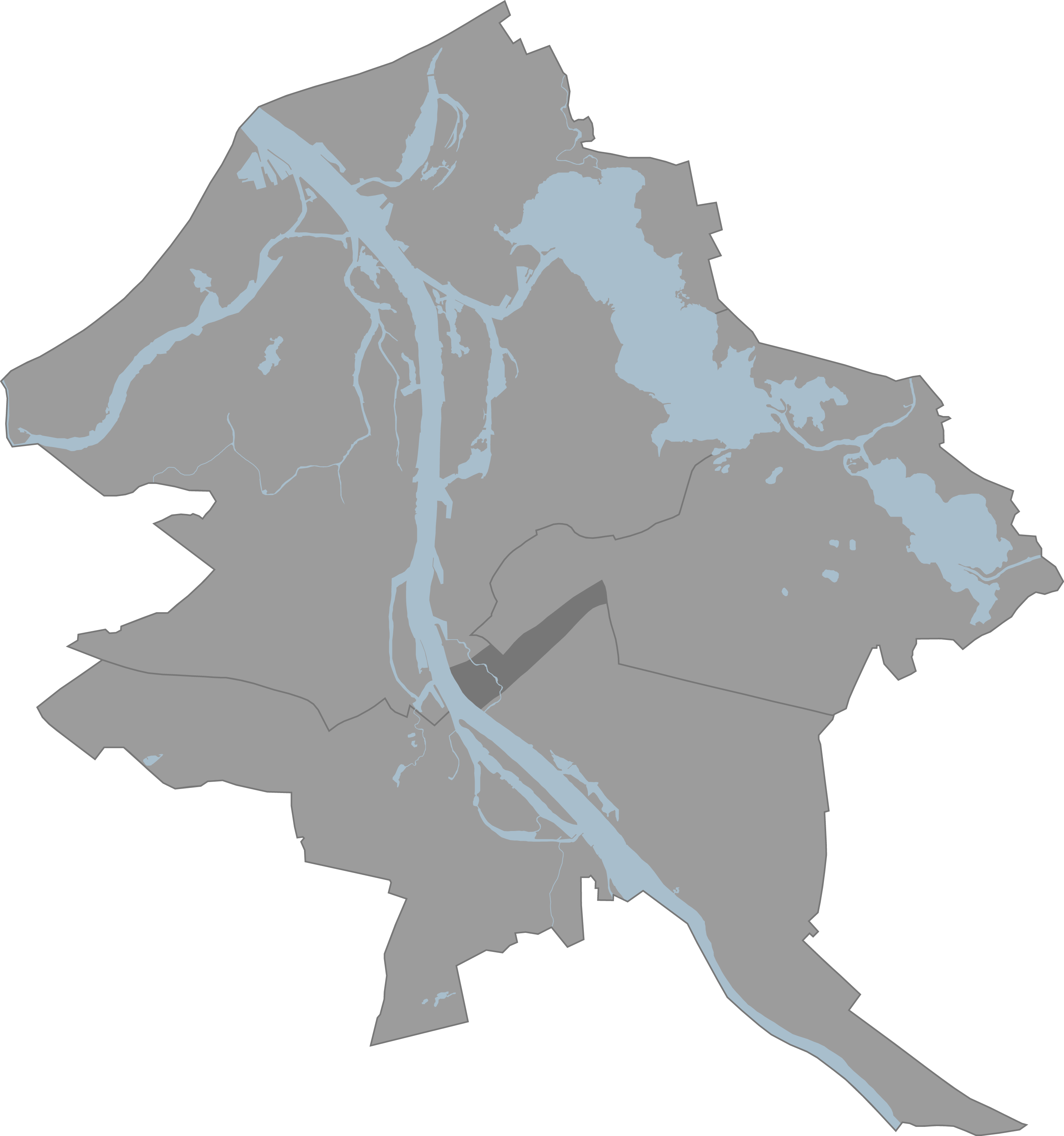 Riga Centra rajons karte